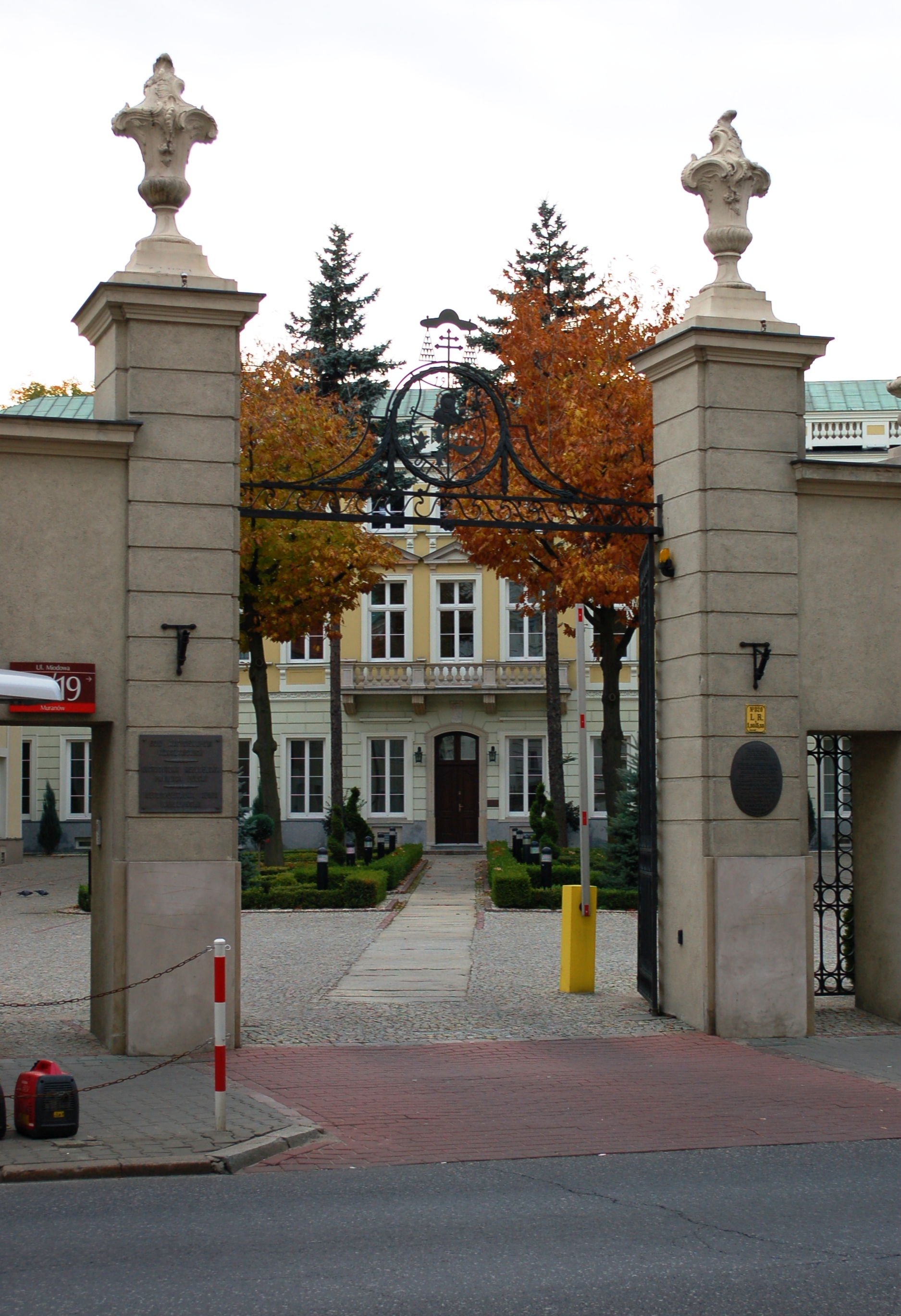 Miodowa street in Warsaw